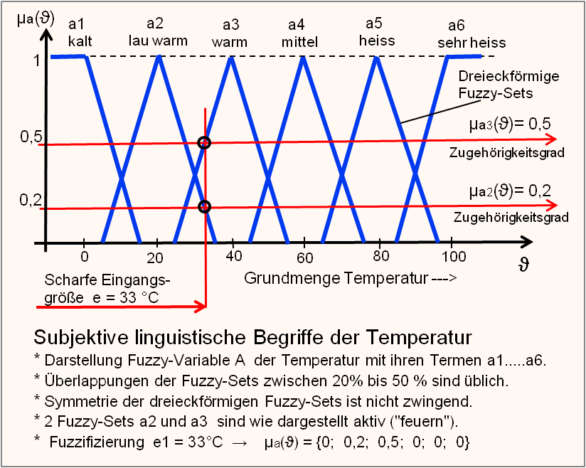 Grafische Darstellung einer linguistischen Variable